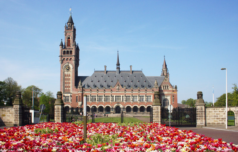 Palais de la Paix vue de face depuis la place de Carnegie